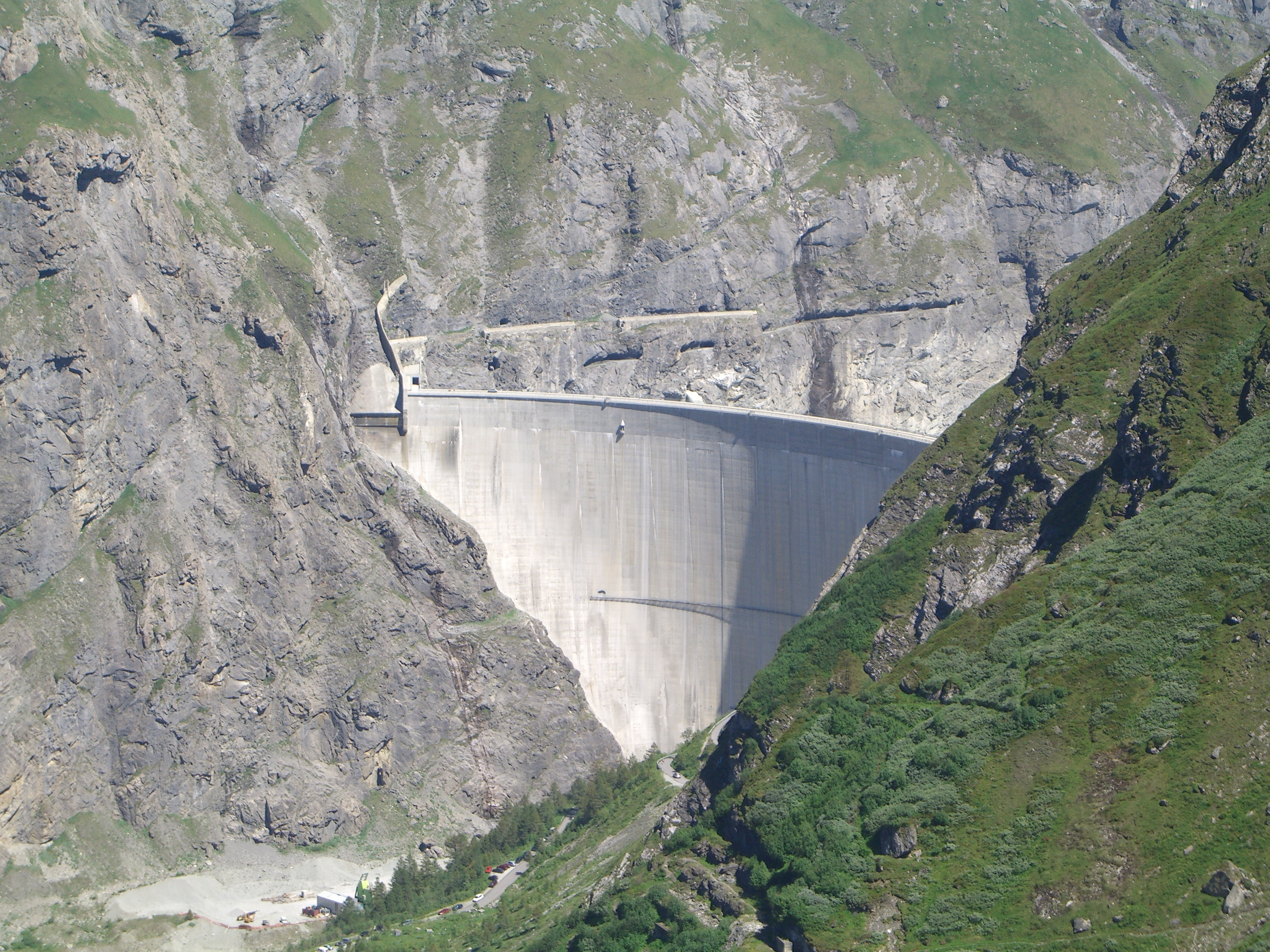 Mauvoisin Dam, Valais, Switzerland